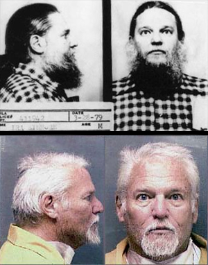 Deux photo de Ira Einhorn (les deux du gouvernement des États-Unis d'Amérique). Les deux d'en haut sont de 1979, les deux autre date de 2001 lorsque il retourna aux USA.